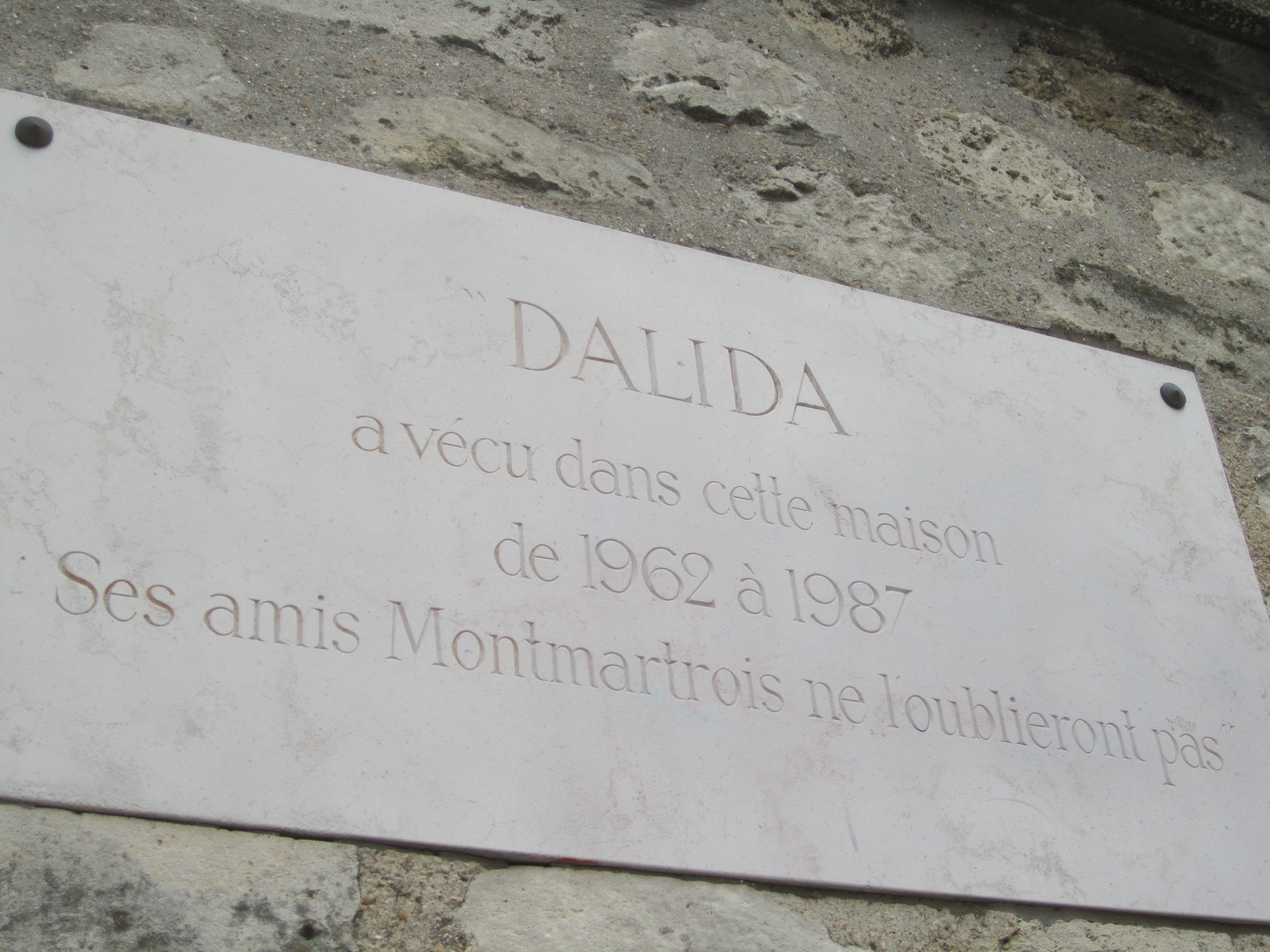 La plaque a été posée par les amis de Montmartre de la chanteuse Dalida.